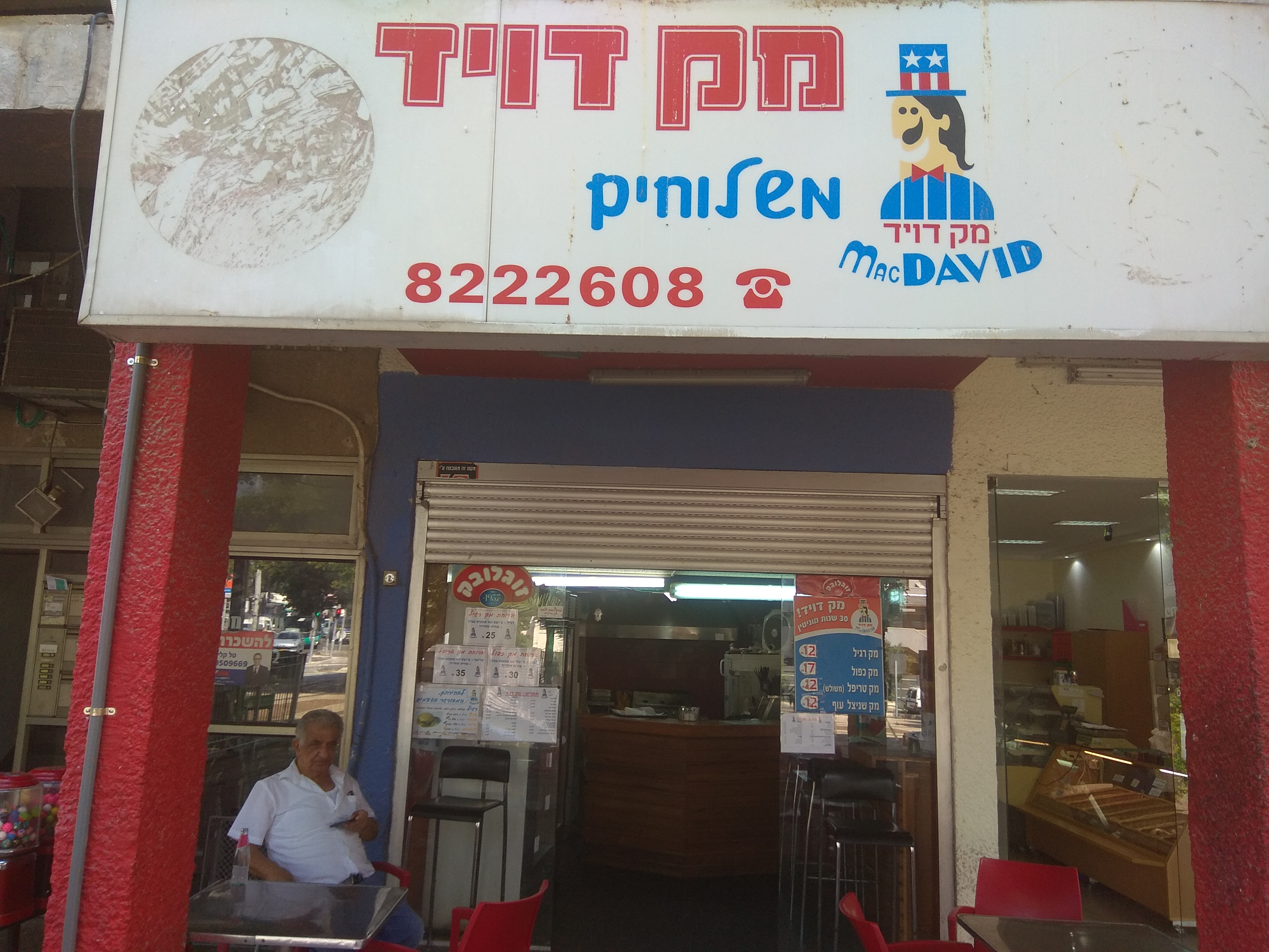 סניף מק דיוויד, חיפה